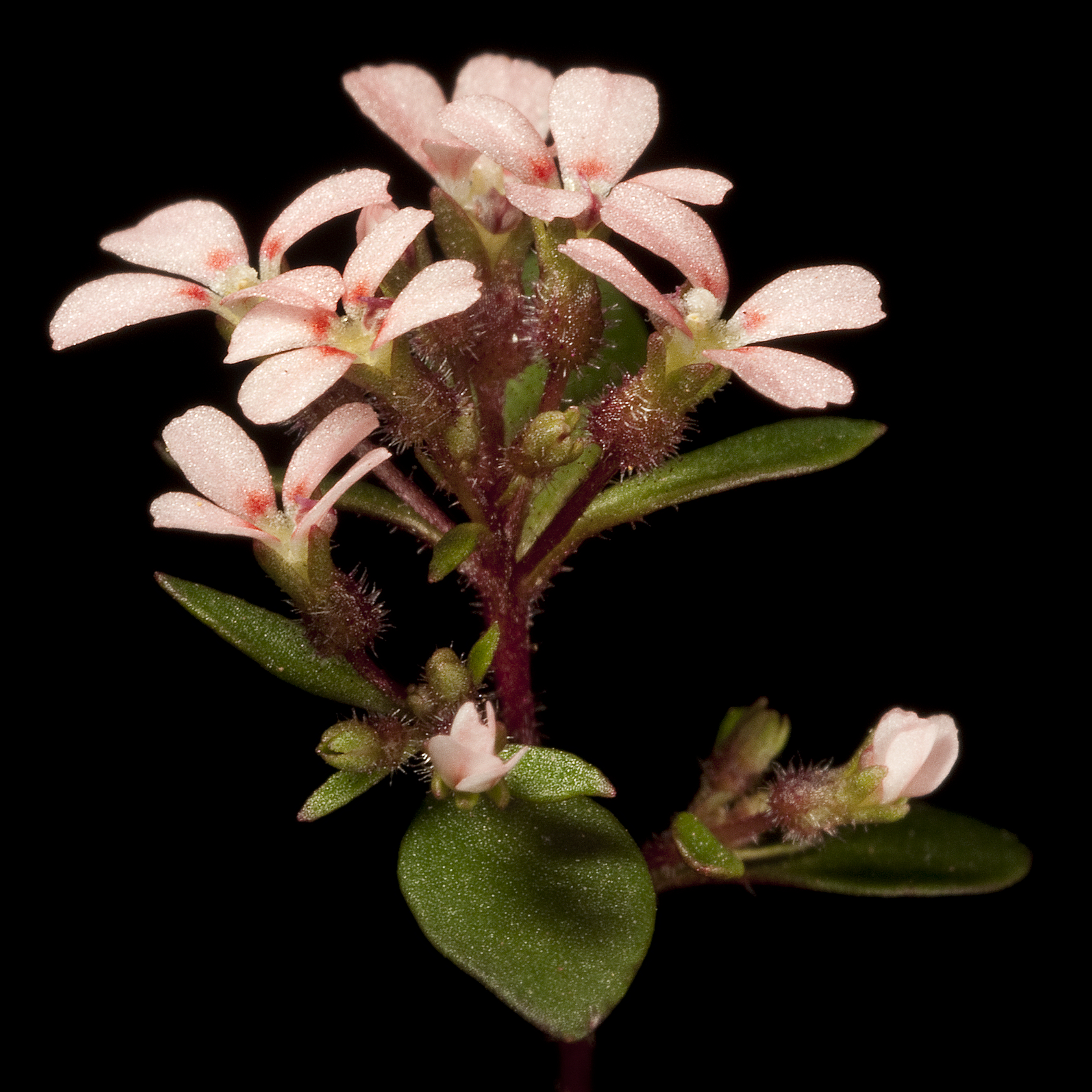 JA Wege 1829